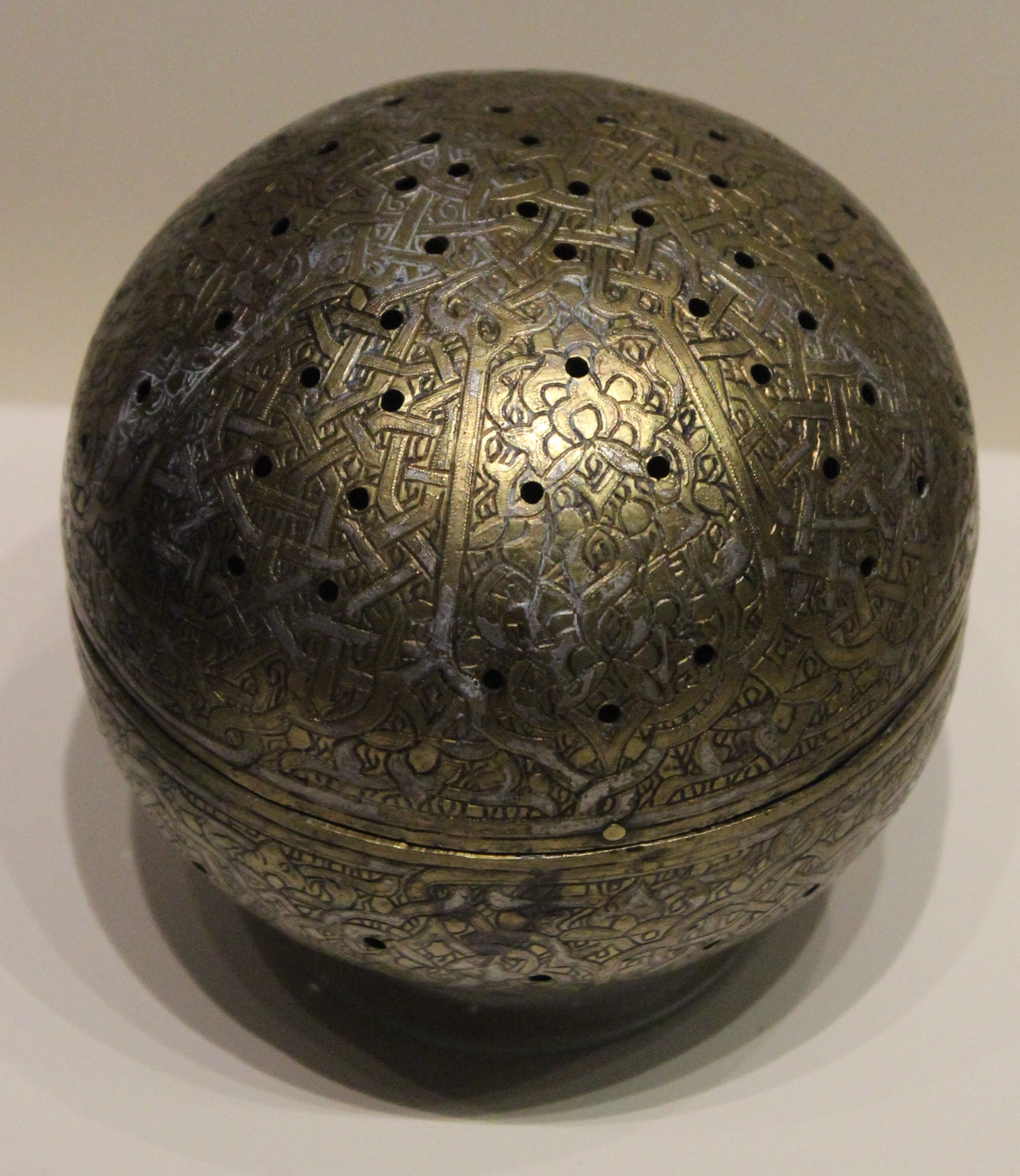 Madrid M.A.N. arte nazarí. Pebetero del s. XIV.